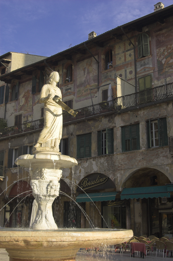 La statua di Madonna Verona in piazza delle Erbe